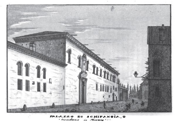 Schifanoia Palace, Ferrara